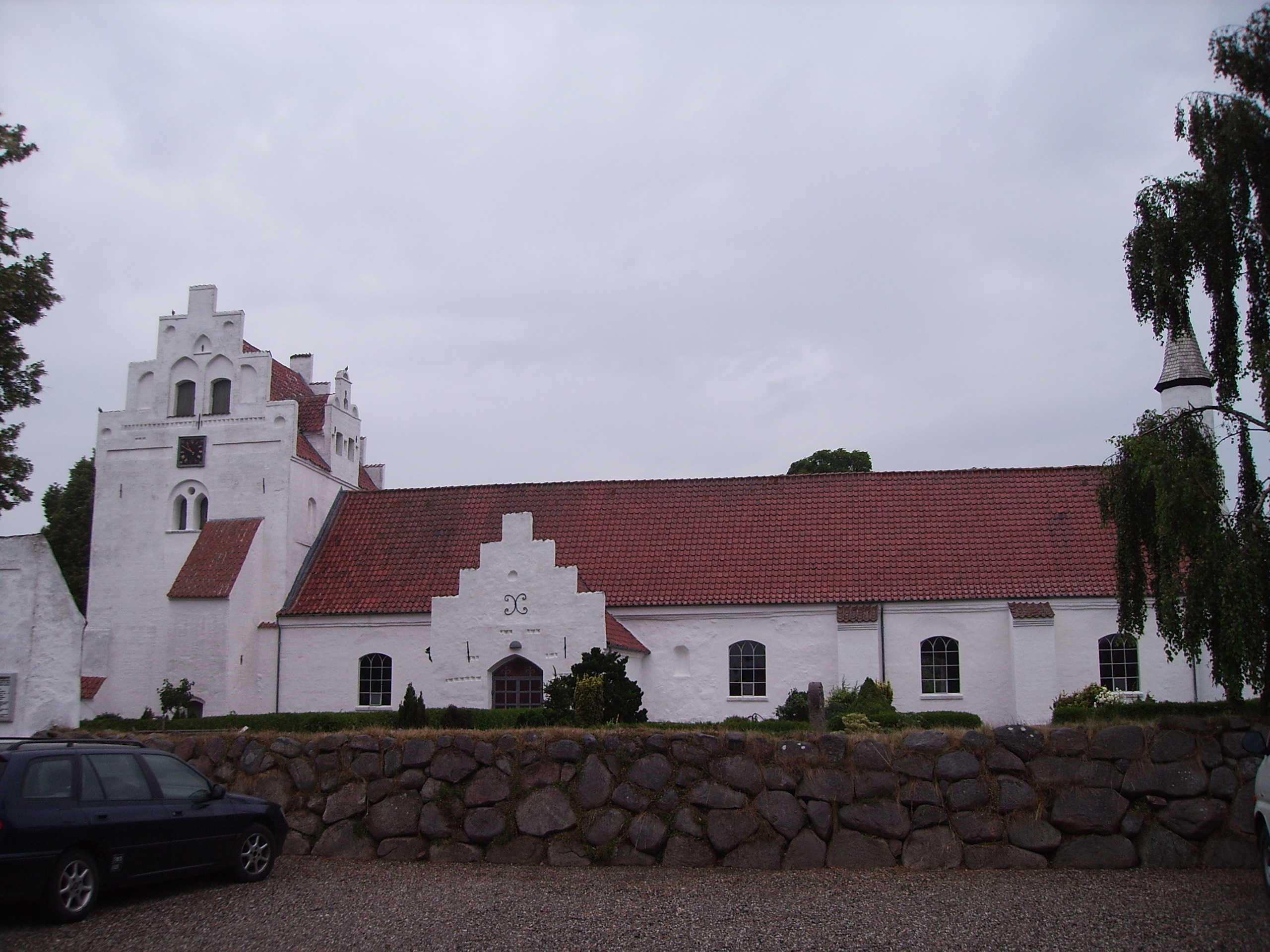 Mesinge Kirke, Mesinge Sogn, Bjerge Herred, Odense Amt, Denmark (Danish Church)